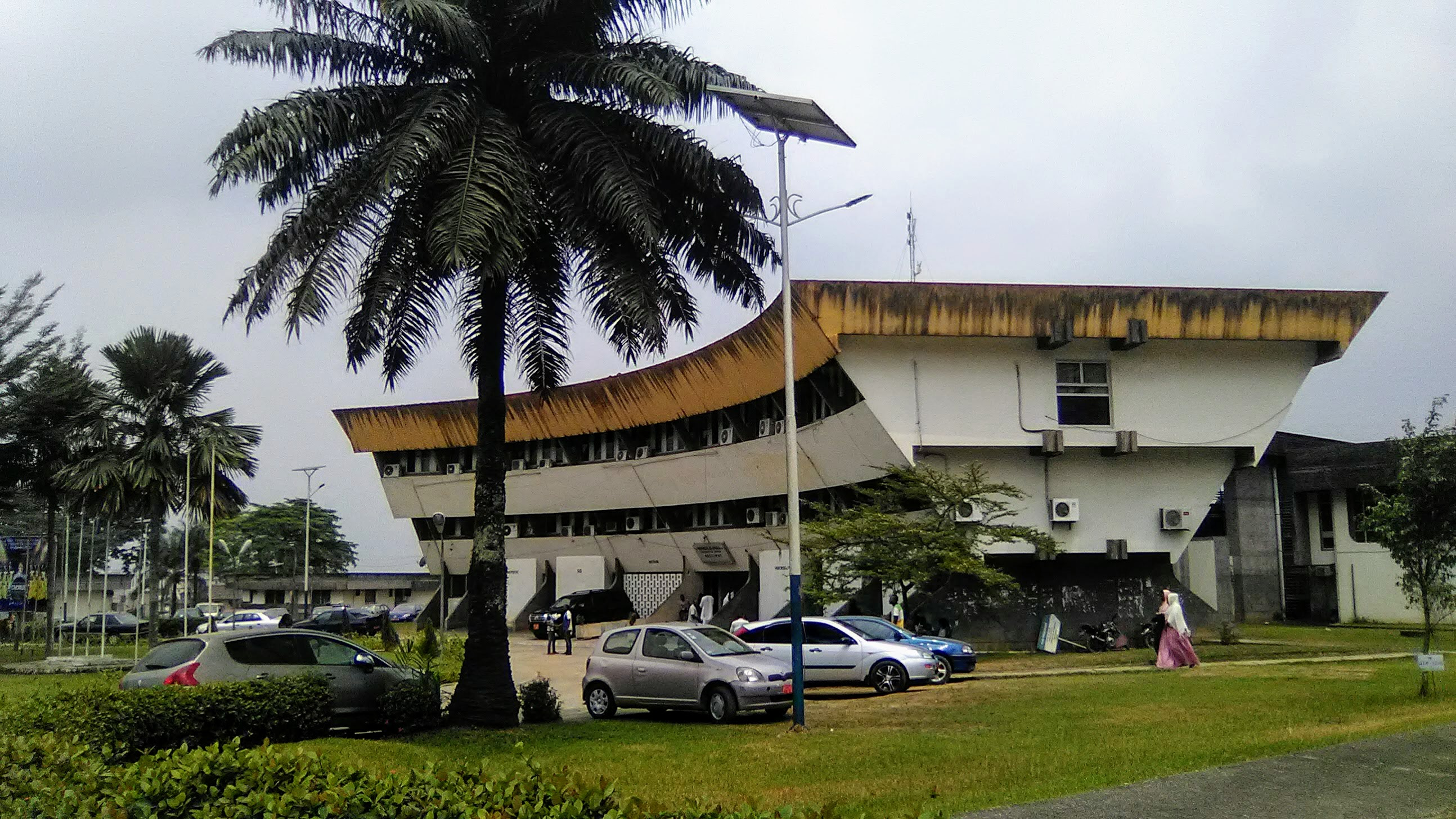 Le bâtiment qui abrite les services du recteur de l'université de Douala